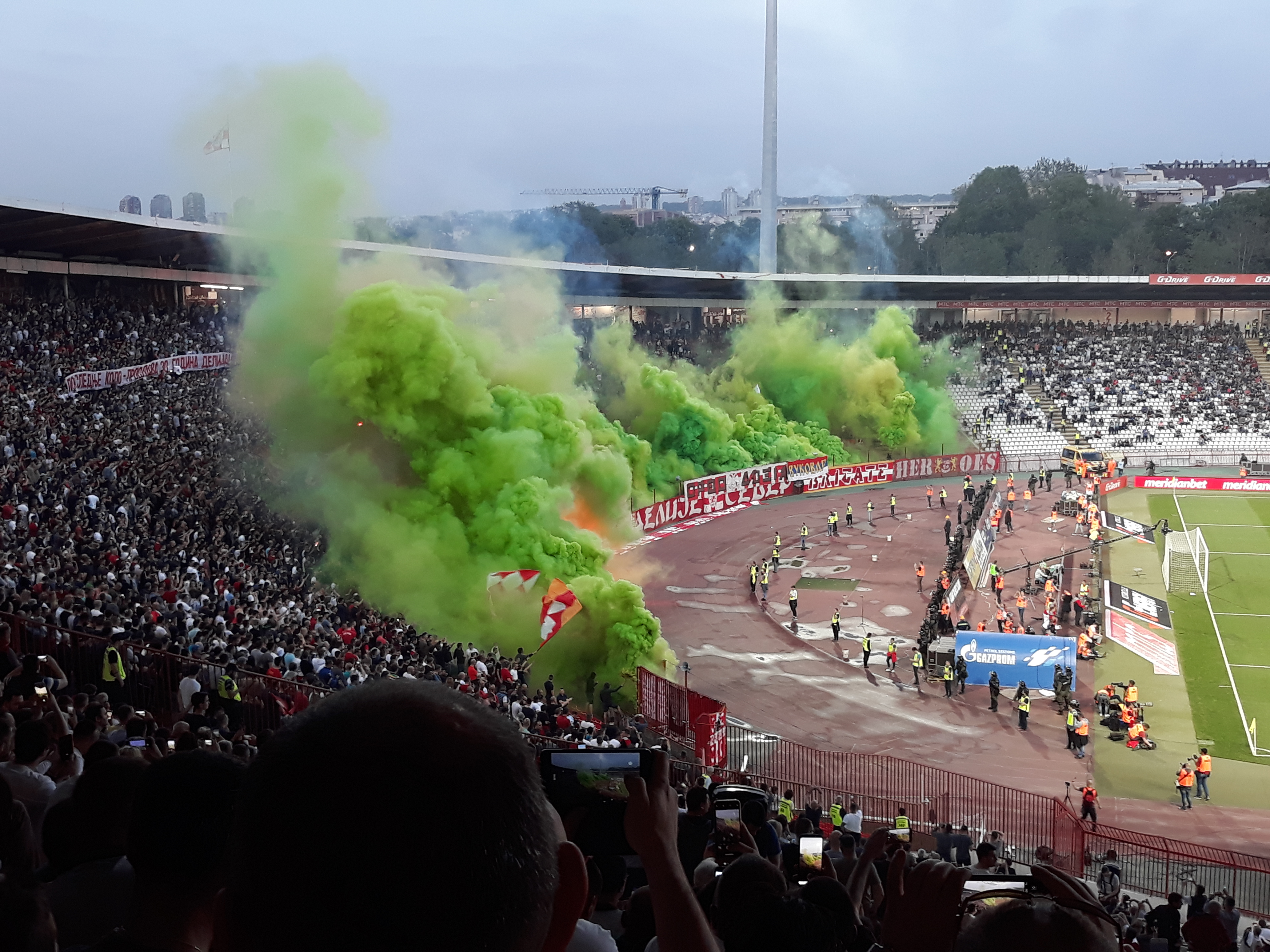 160. Вечити дерби, између Црвене звезде и Партизана, одигран на Стадиону Рајко Митић у Београду.